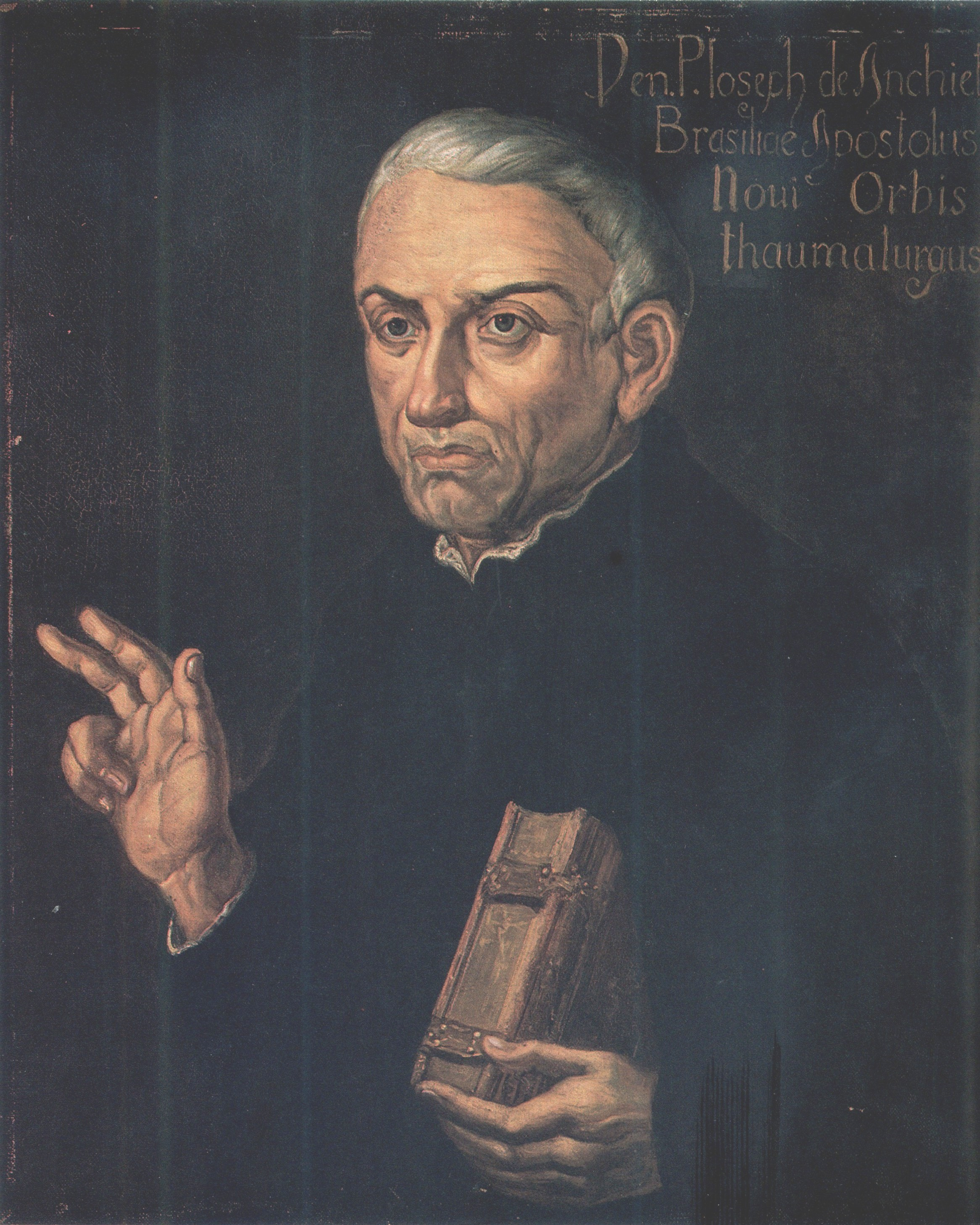 Depicted person: José de Anchieta